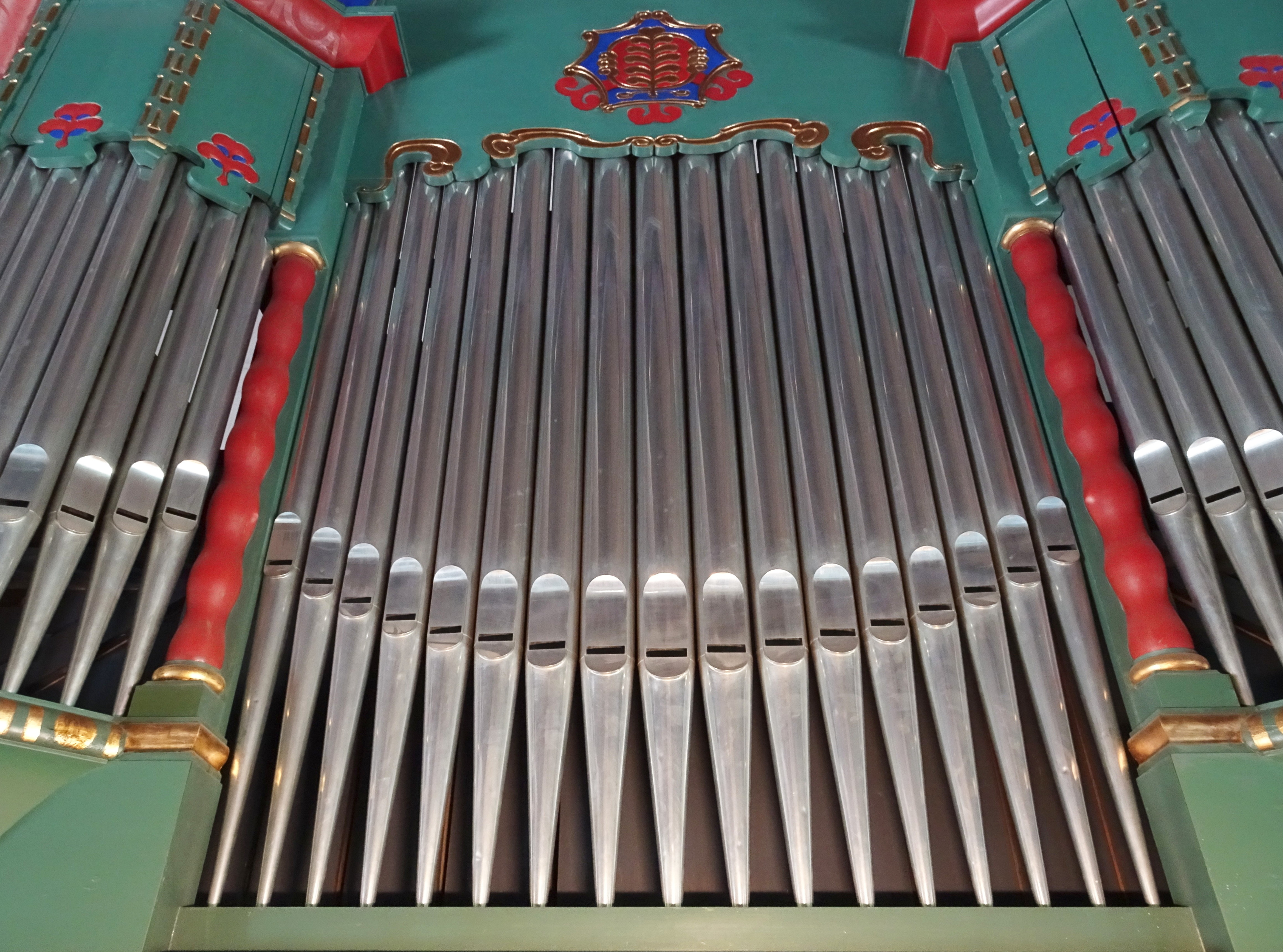 Ingatorps kyrka, interiör